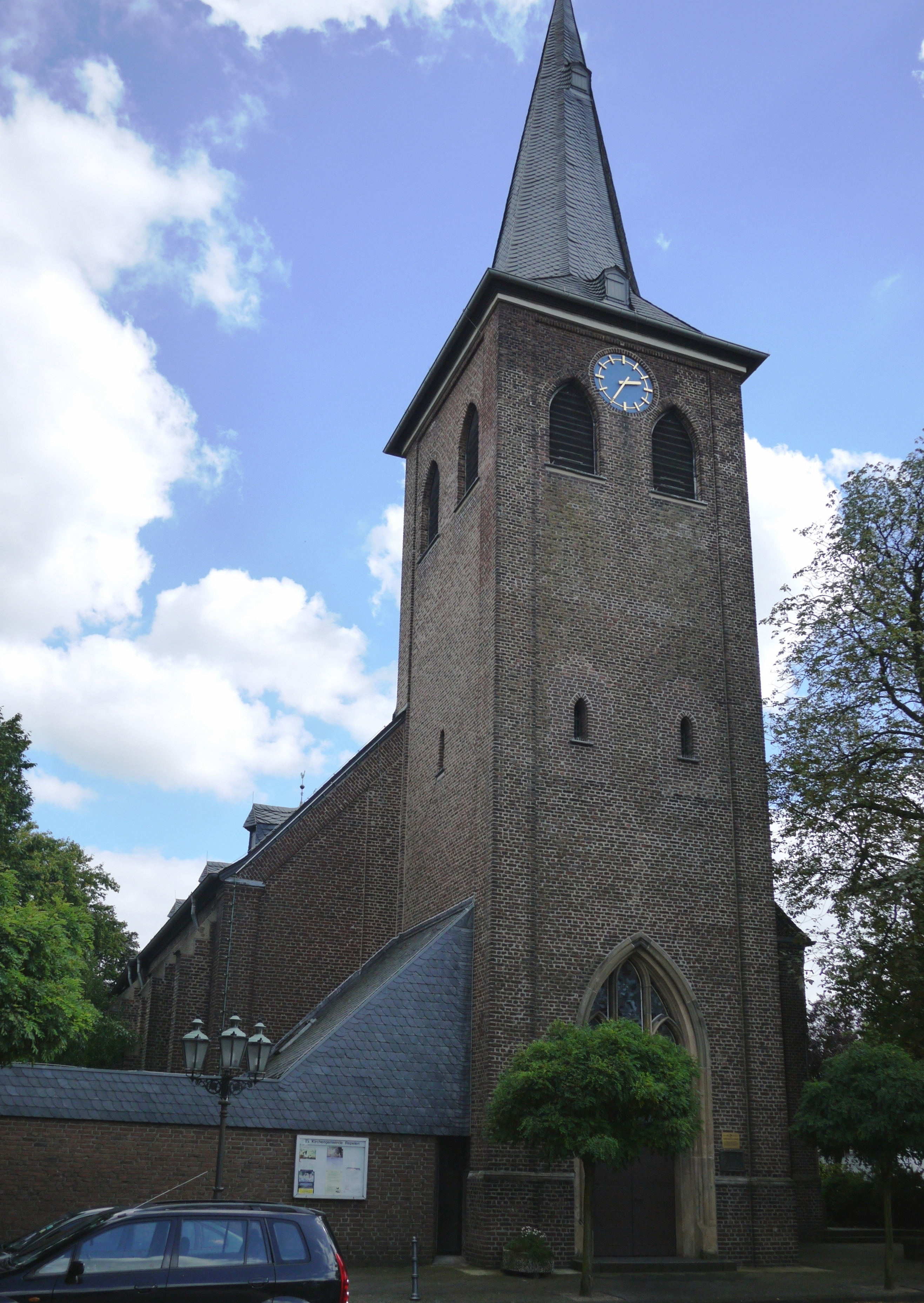 Dorfkirche Repelen in Moers, denkmalgeschützt